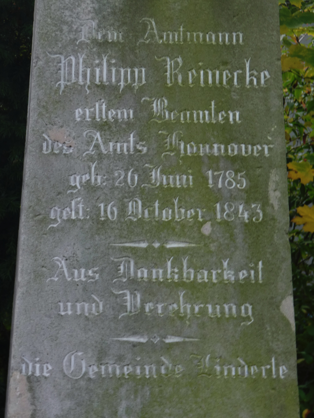 Das 1850 bei Linderte aufgestellte Amtmann-Reinecke-Denkmal ist ein Obelisk aus Wealdensandstein. Detail: Die Inschrift auf der Vorderseite